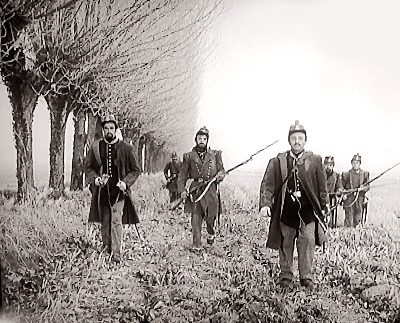 La marcia dei soldati nelle campagne novaresi (da "La pattuglia sperduta, Nelli 1954)